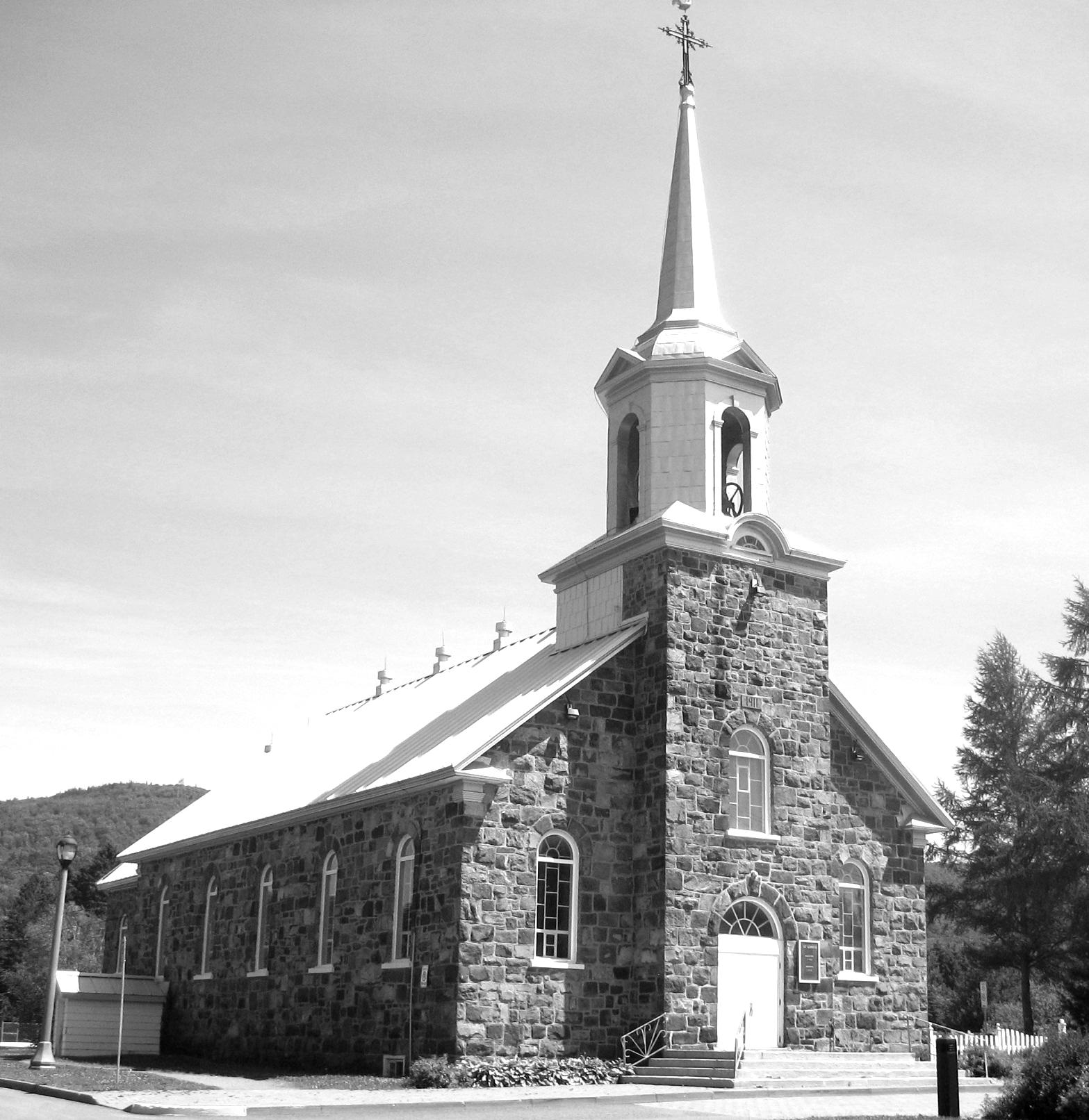 Eglise St-Edmond de Stoneham Qc Canada